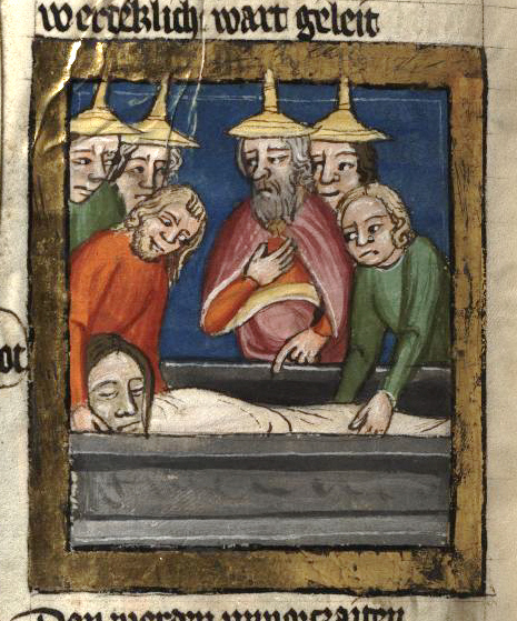 Rudolf von Ems: Weltchronik. Böhmen (Prag), 3. Viertel 14. Jahrhundert. Hochschul- und Landesbibliothek Fulda, Aa 88. Bildbeschreibung nach Martin Roland. Miniatur 90 163v Bestattung Josuas